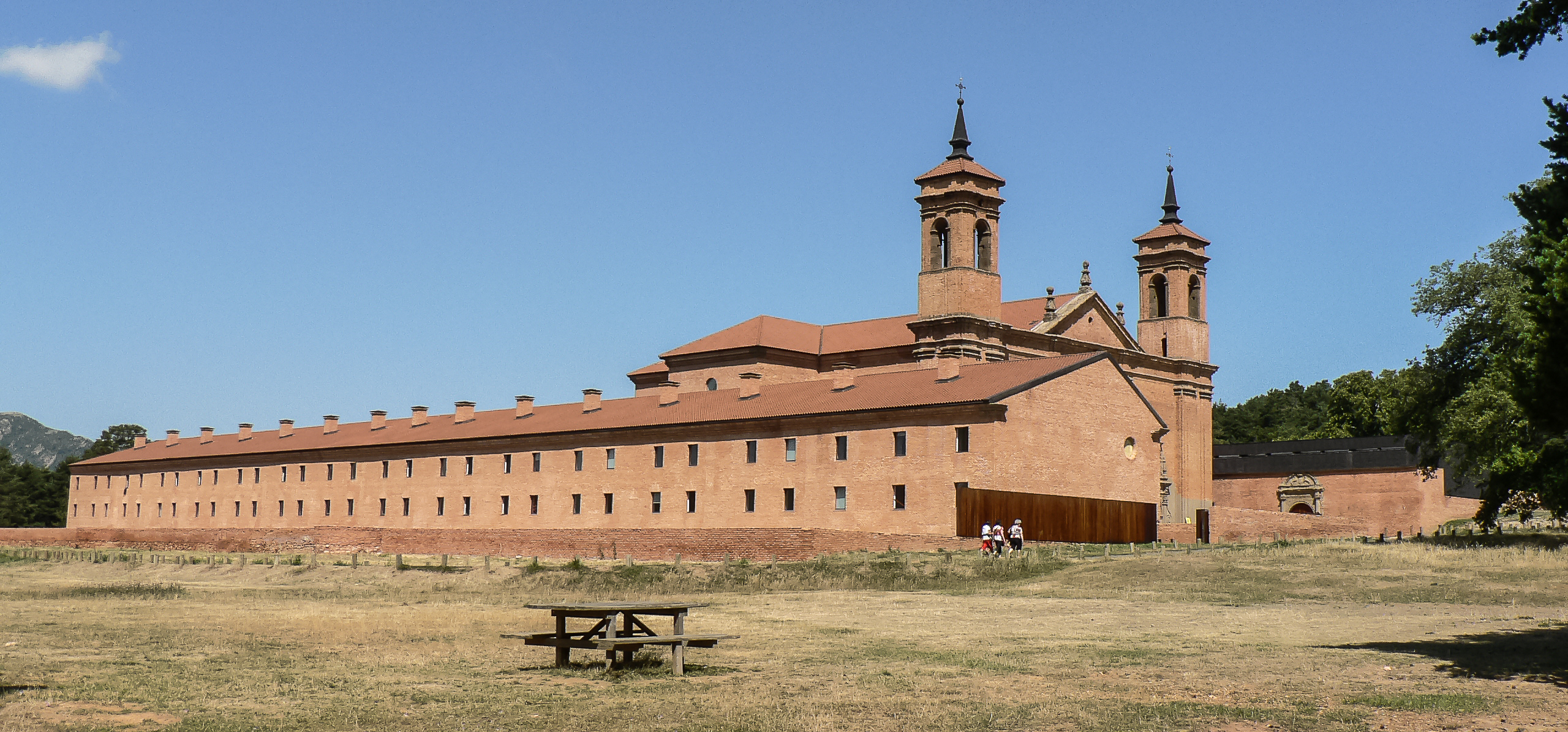 CS 22082009 #123630 #45624.jpg